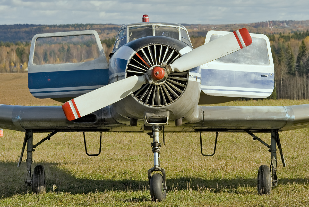 Yak-18t